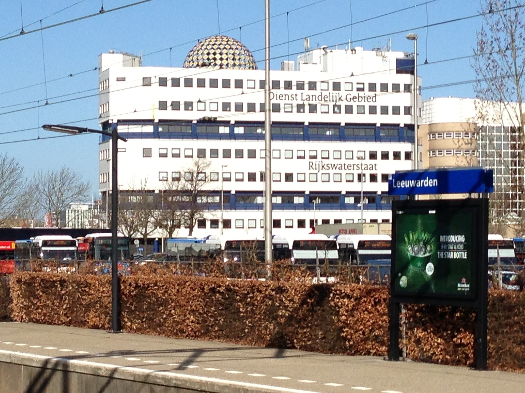 Vestiging RWS Noord-Nederland en Dienst Landelijk Gebied in Leeuwarden